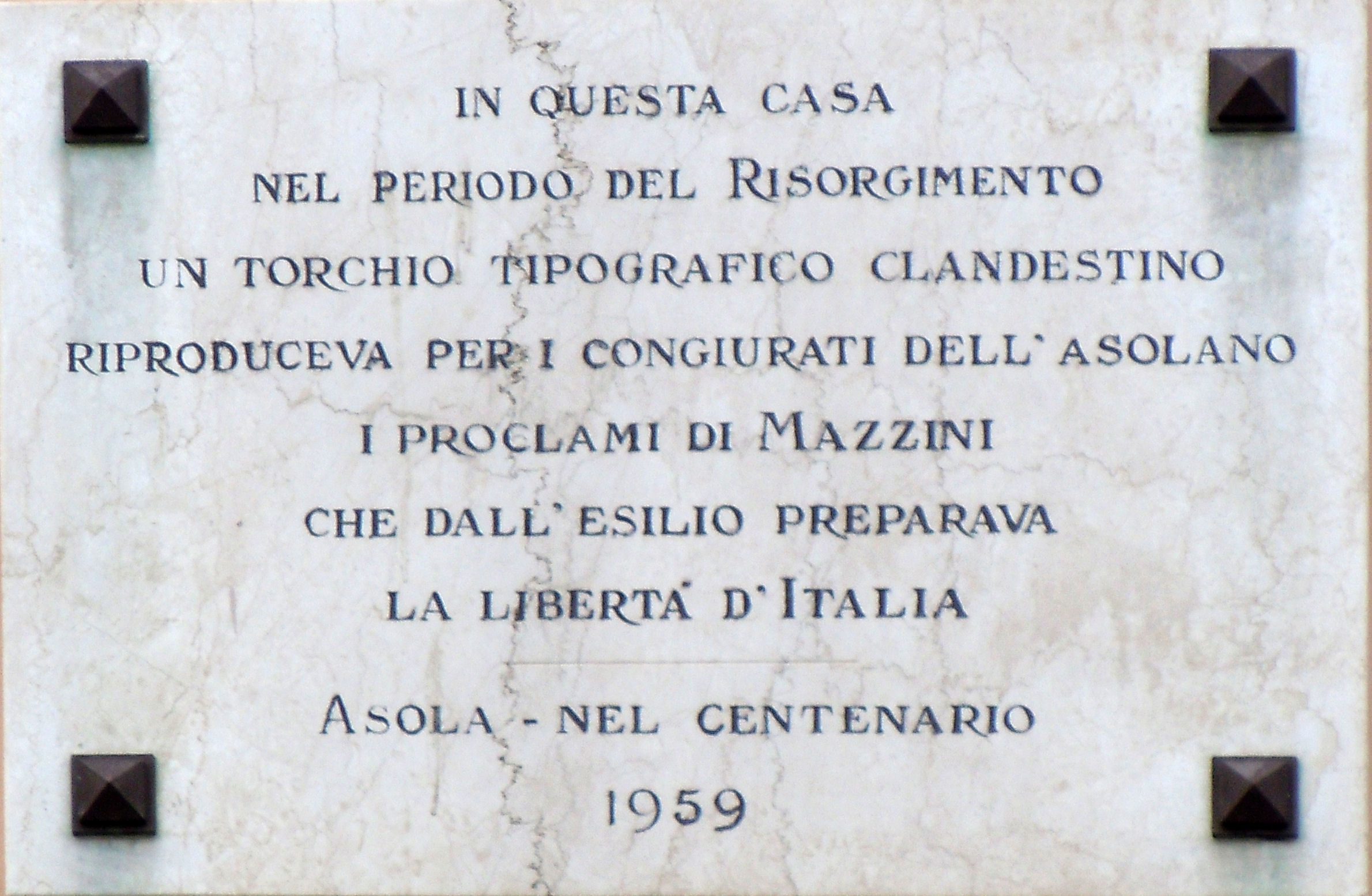 Asola, lapide mazziniana.